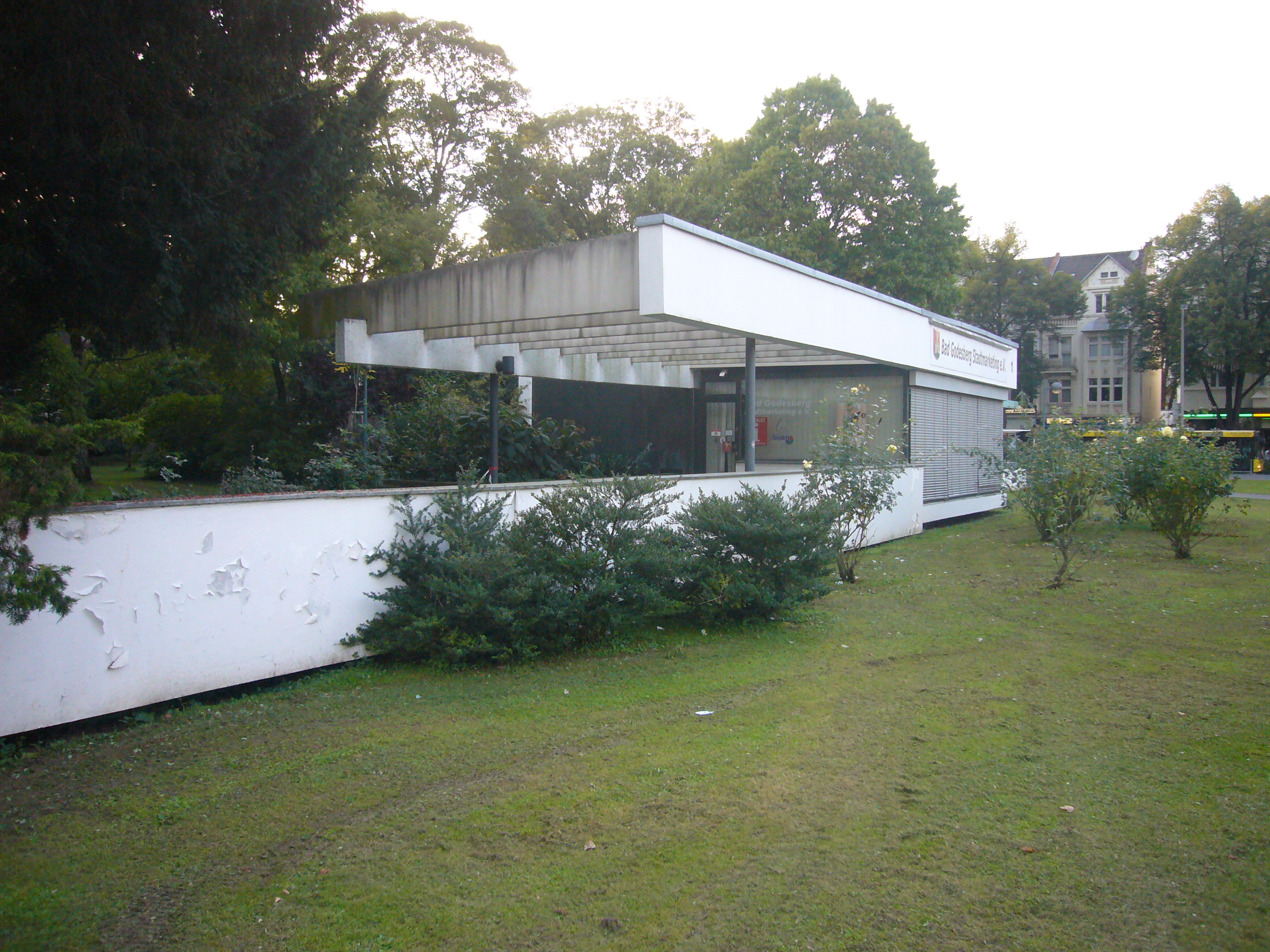 Der ehemalige Verkehrspavillon am Ria-Maternus-Platz in Bad Godesberg, Ortsteil Alt-Godesberg